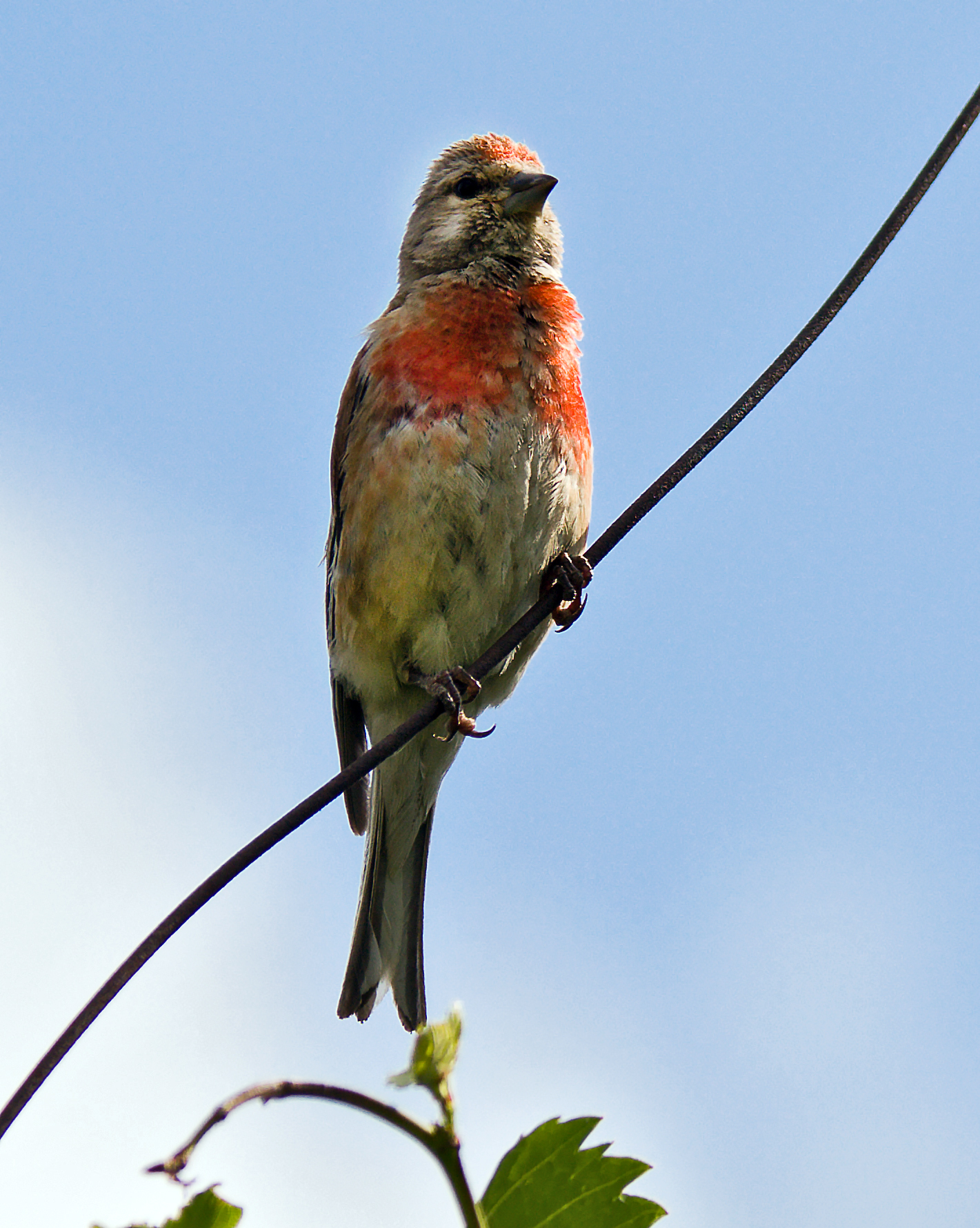 Коноплянка. Снято в Молдавии